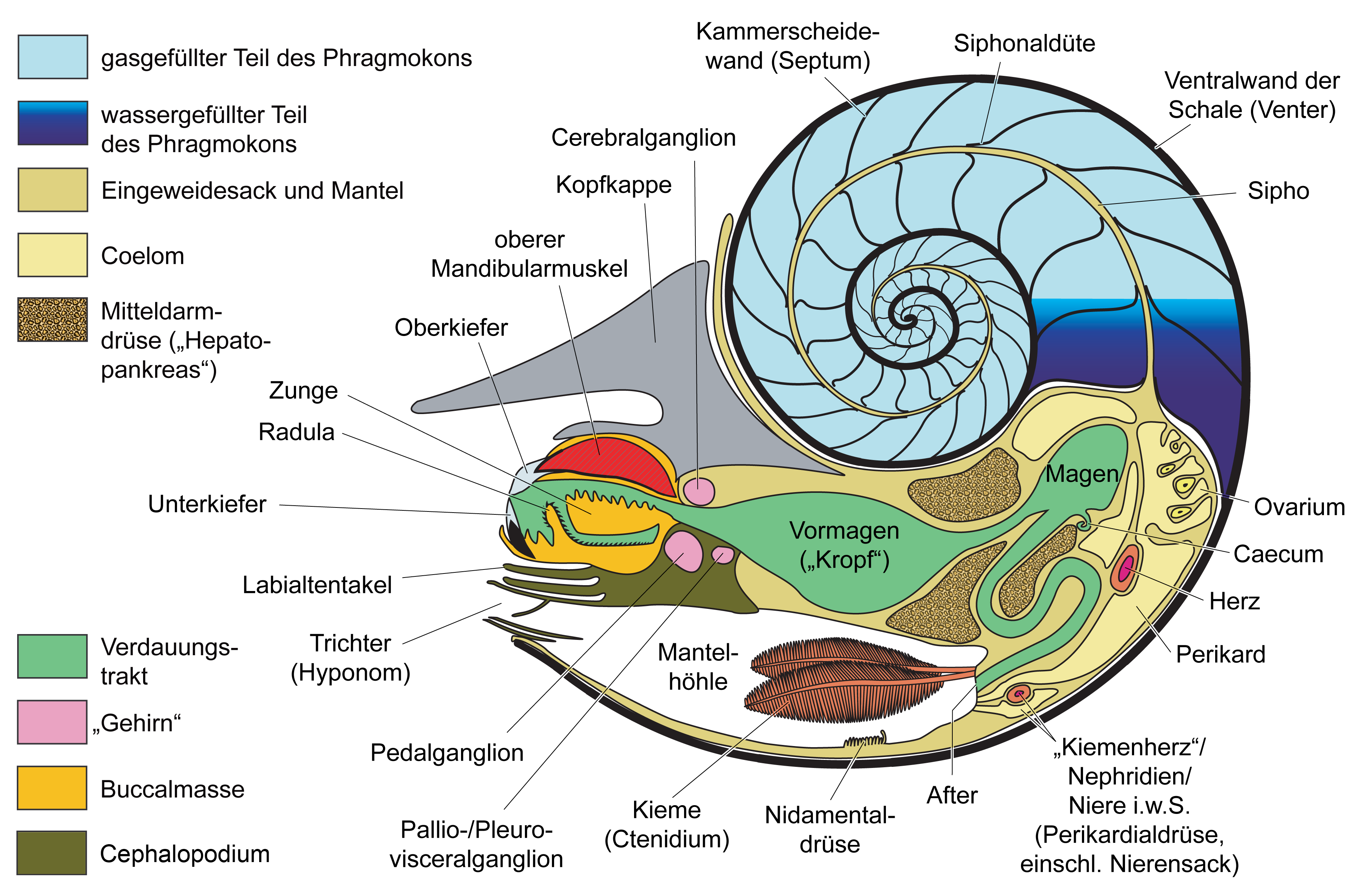 Schematischer Längsschnitt durch einen Kopffüßer der Gattung Nautilus (weibliches Individuum),ergänzt um einige Elemente, die in einem zweidimensionalen Schnitt nicht zu sehen wären (z.B. alle beiden rechten Kiemen in Gänze), nach Griffin (1900)[1] und Haszprunar & Götting (2007).[2] ↑ Lawrence E. Griffin (1900): The anatomy of Nautilus pompilius. Memoirs of the National Academy of Sciences 8(5):103–197, text-fig. 1 (pp. 106/107) ↑ Gerhard Haszprunar, Klaus-Jürgen Götting (2007): Cephalopoda, Kopffüßer. Pp. 352–362 in: Wilfried Westheide, Reinhard Rieger (eds.): Spezielle Zoologie. Teil 1: Einzeller und Wirbellose Tiere. 2nd edition. Spektrum (Elsevier), Munich, fig. 472